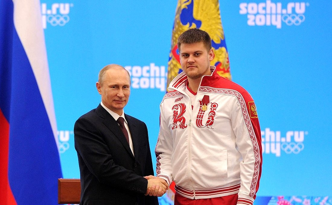 Медалью ордена «За заслуги перед Отечеством» первой степени награждён серебряный призёр Олимпийских игр в санном спорте Александр Денисьев.